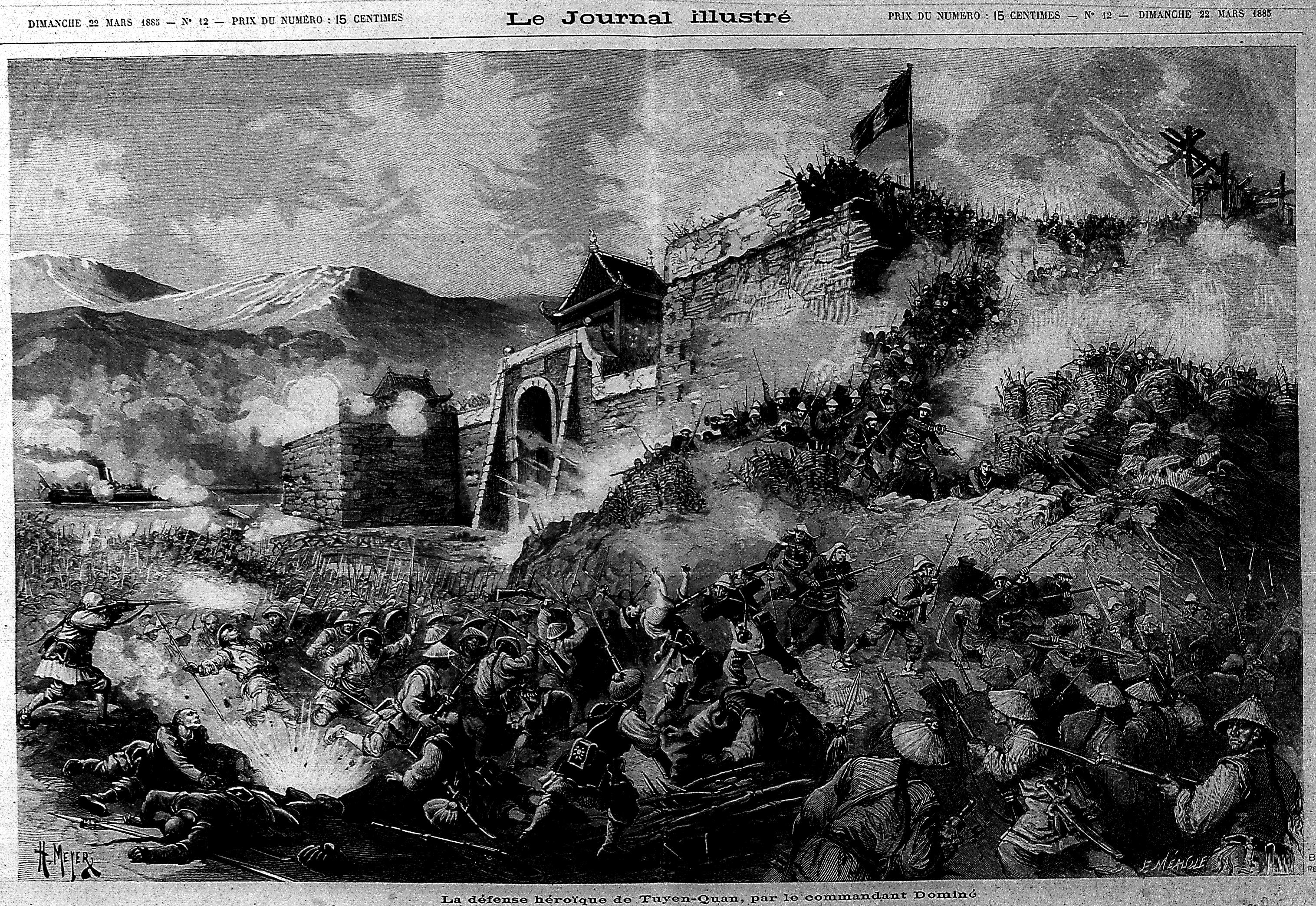 issu du microfilm 92 de la BMR.